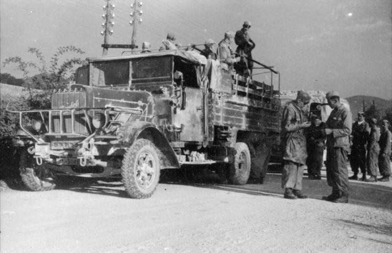 Italien, Abruzzen.- Rückkehr vom Gran Sasso